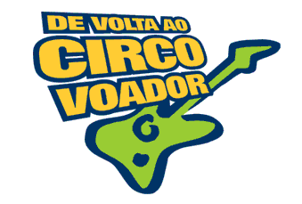 Este logo foi usado nos 11 anos em que o programa De Volta ao Circo Voador foi veiculado na FM Tropical (Natal/RN).